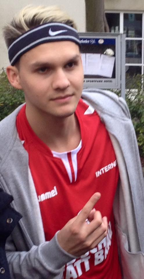 KsFreakWhatElse vor der Sendung Die große ProSieben Völkerball-Meisterschaft (2016)